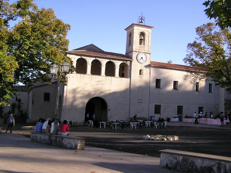 IL Santuario di San Francesco di Paola (Foto di Luigino C.)